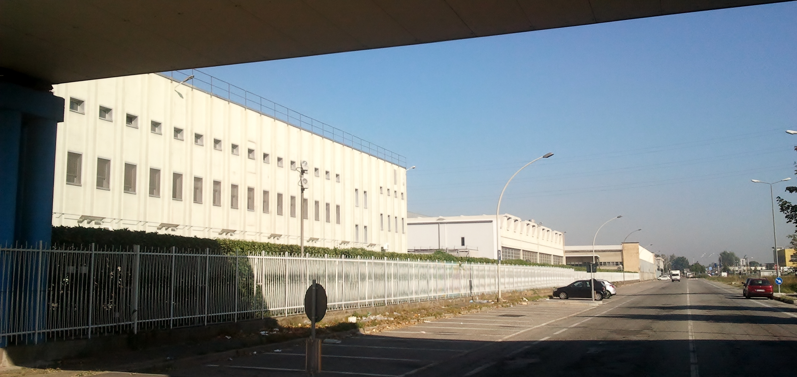 Carrozzeria Bertone. Torino. Italy